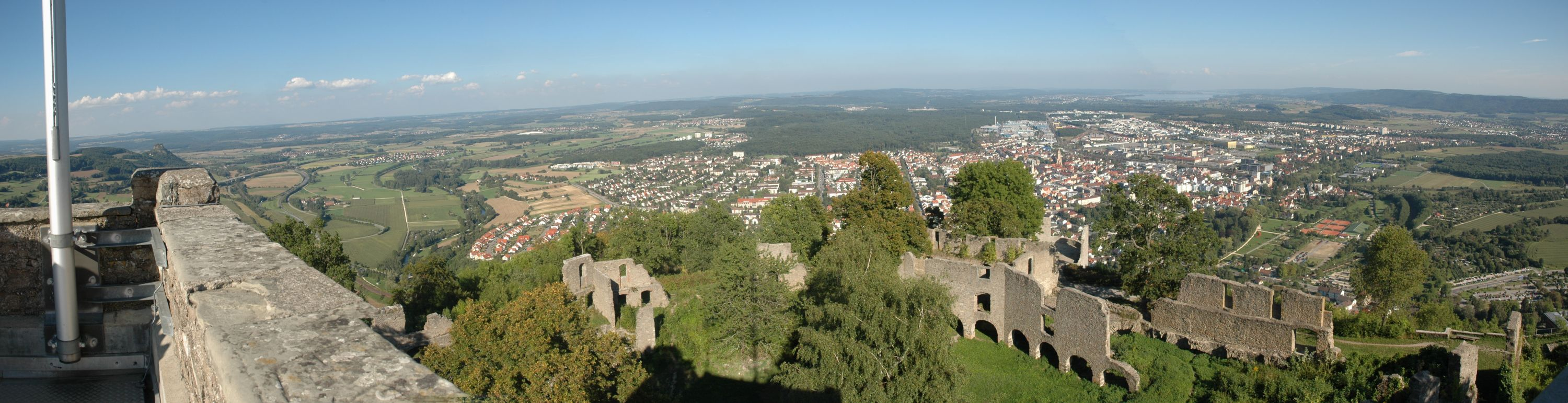 Beschreibung: Panorama-Blick von der Festung Hohentwiel hinunter nach Singen. Quelle: selbst fotografiert Datum: 8. September 2005 Ort: Singen (Hohentwiel) Fotograf oder Zeichner: Alex Kamera: Nikon D 70 Software: The GIMP/Panorama Maker Andere Versionen